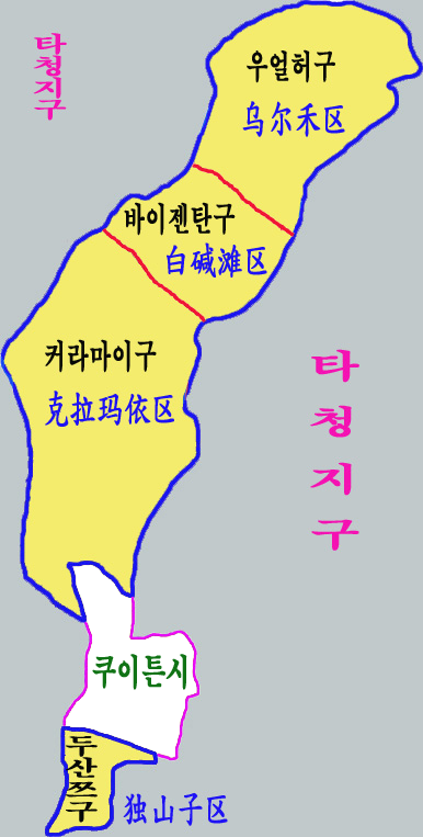 커라마이시 시할구도